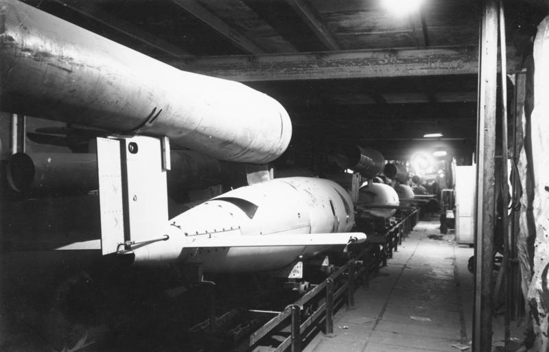 G8501 A 206